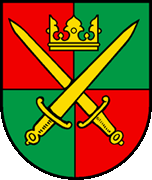 Wappen von Villars-le-Comte Kanton Waadt Schweiz